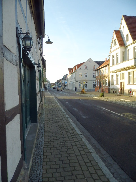 Straßenzug in Bismark (Altmark)